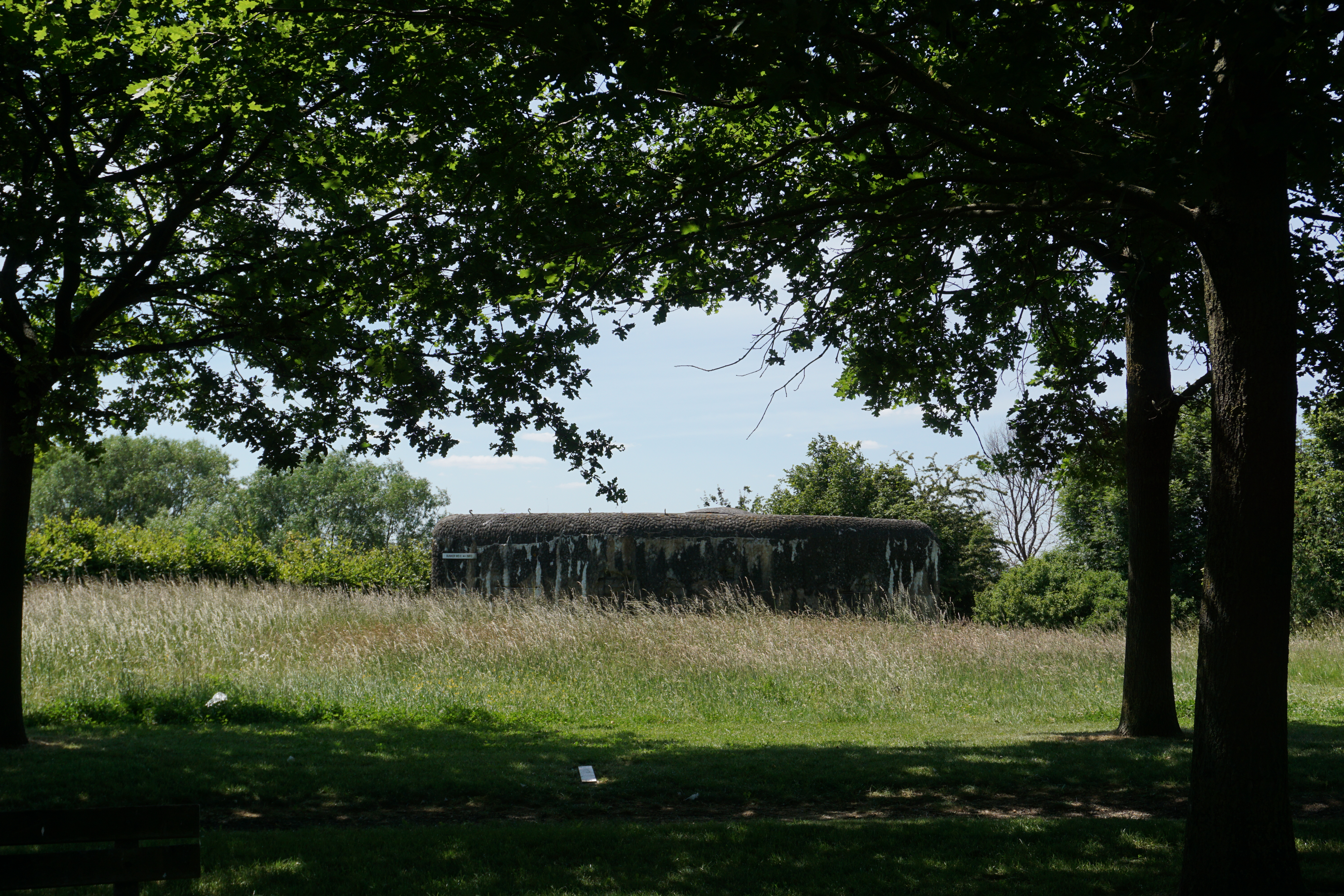 Zicht op de bunker (Bunkerweide Roosdaal)